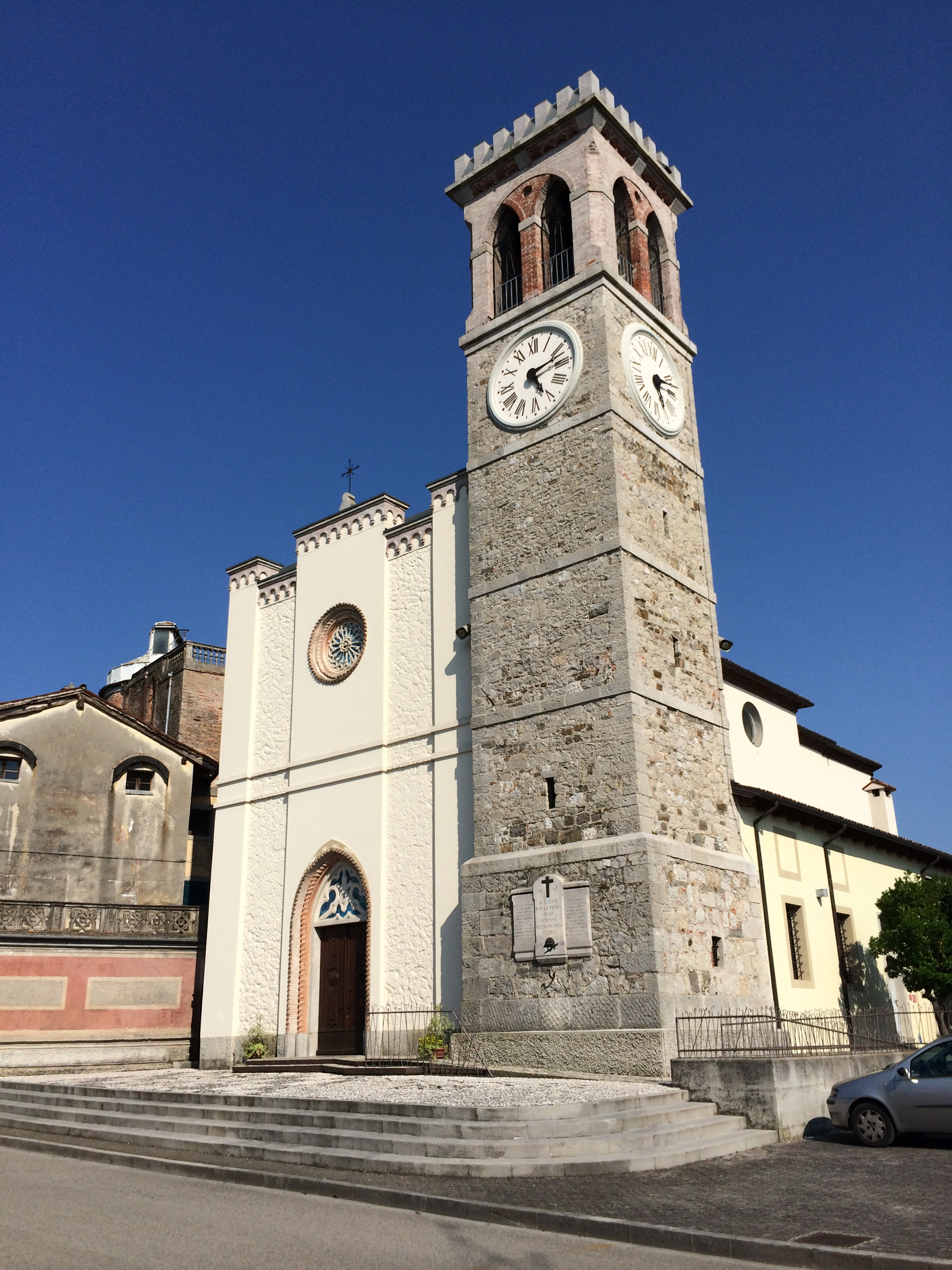 Manzano